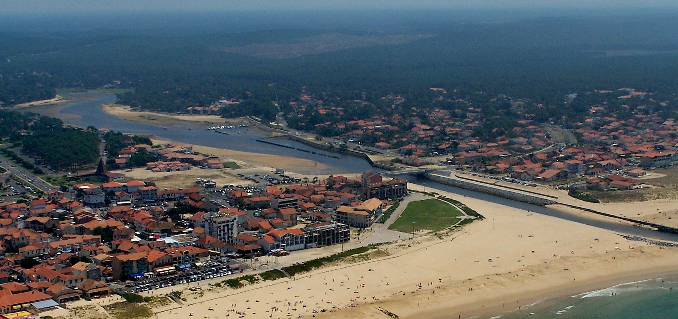 Mimizan-plage, vu d'avion